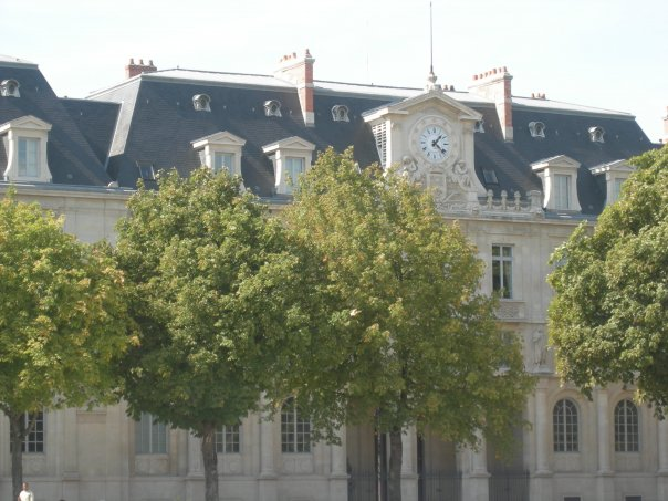 Faculté de Droit - Centre européen. Nancy (France)